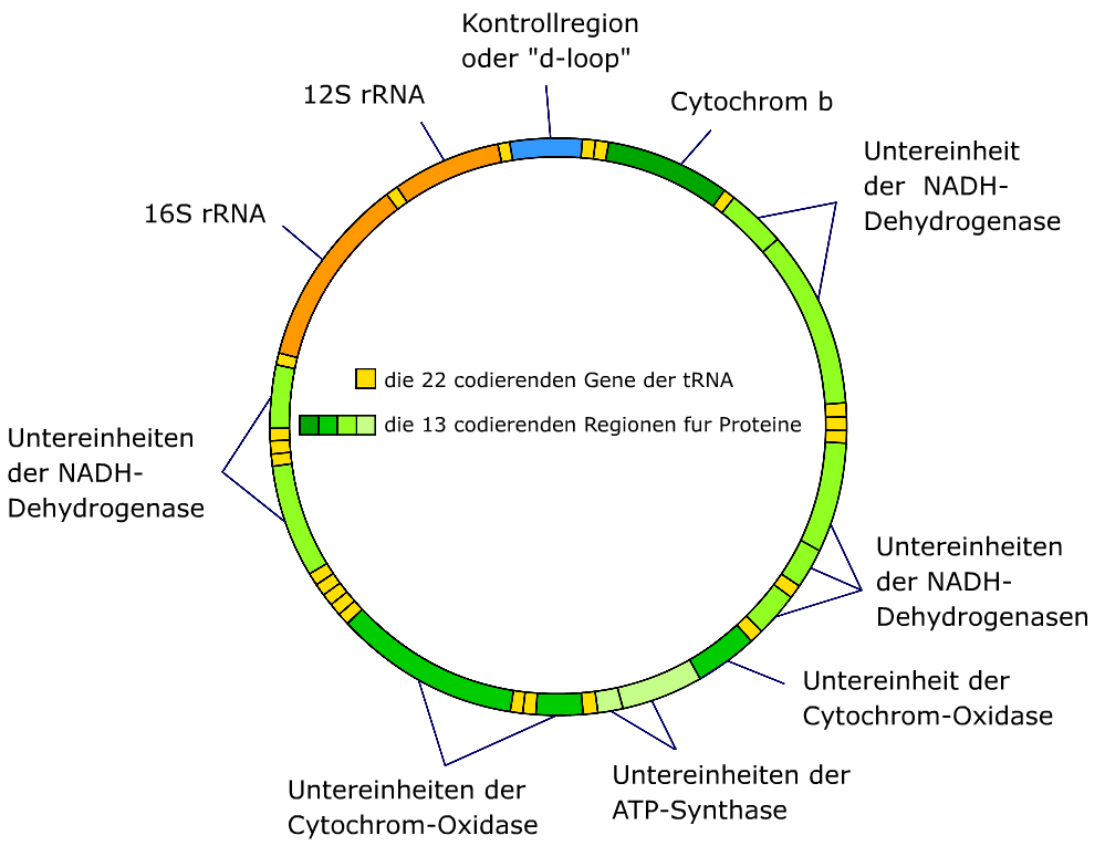 Aufbau der menschlichen mitochondrialen DNA (Eng: Structure of human mtDNA; untereinheit = subunit)